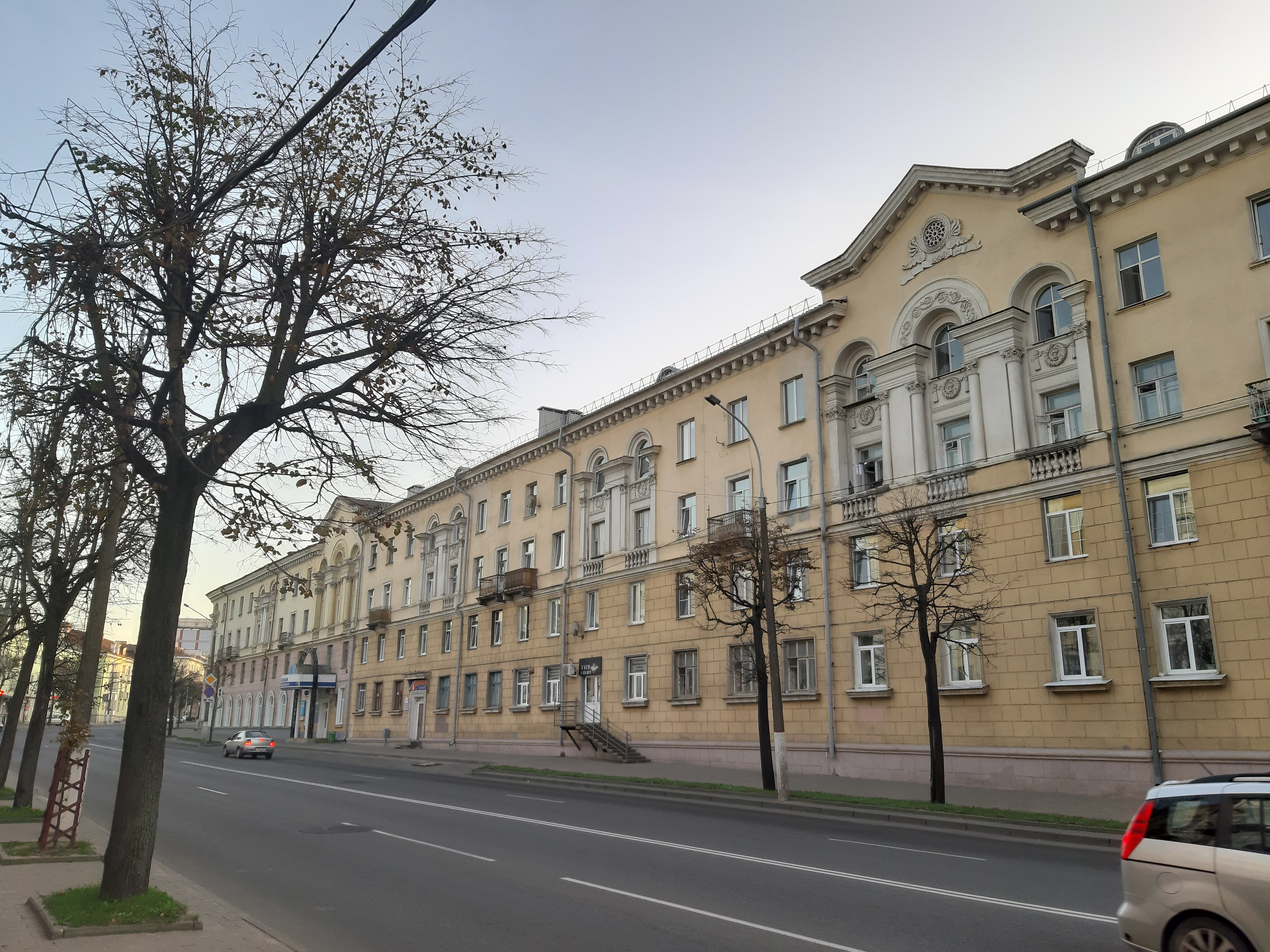 Магілёў. Піянерская 48-50